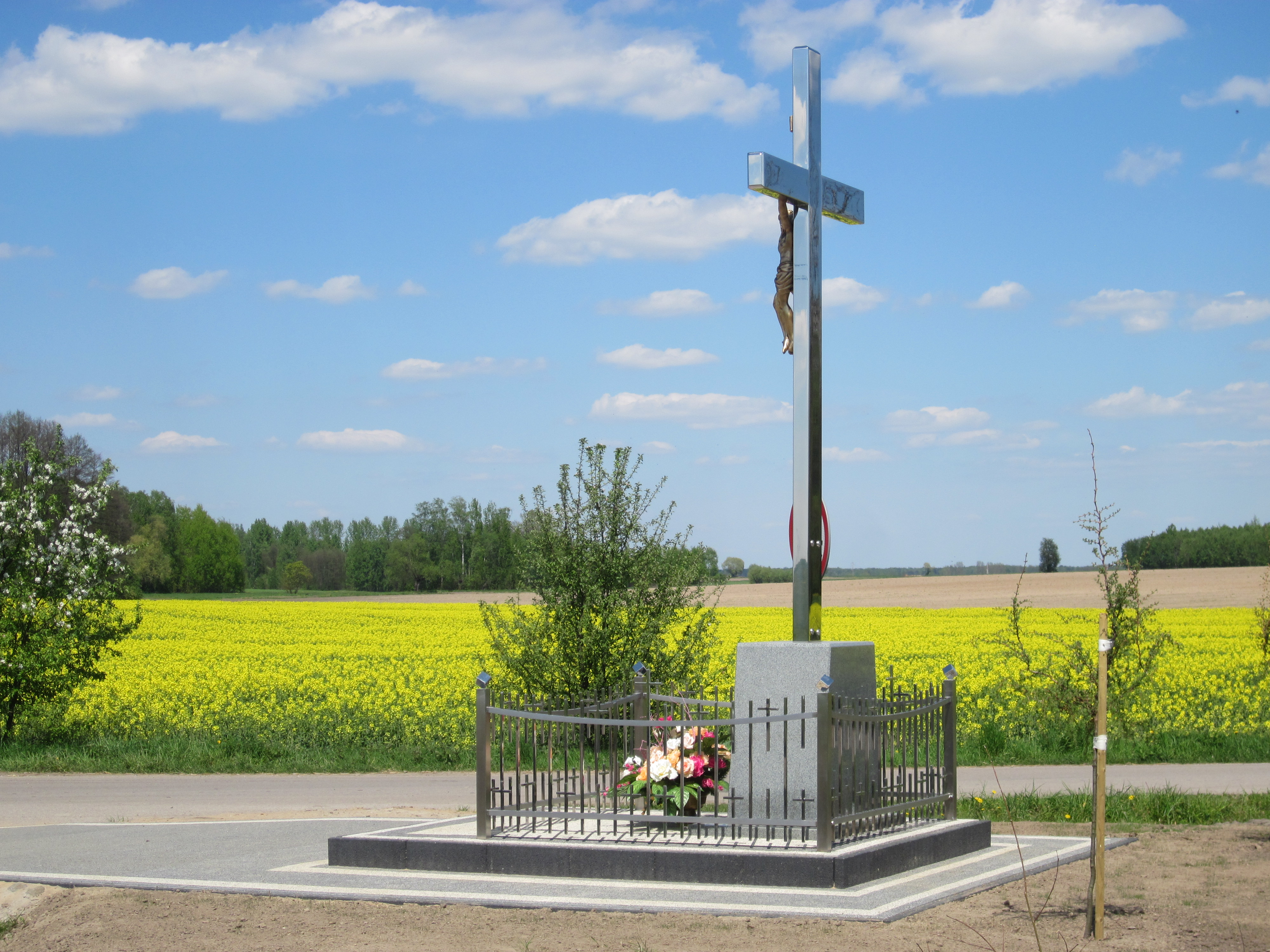 Średnica-Jakubowięta. krzyż został poświęcony 7 maja 2017 roku podczas obrzędu: Świecenia pól.